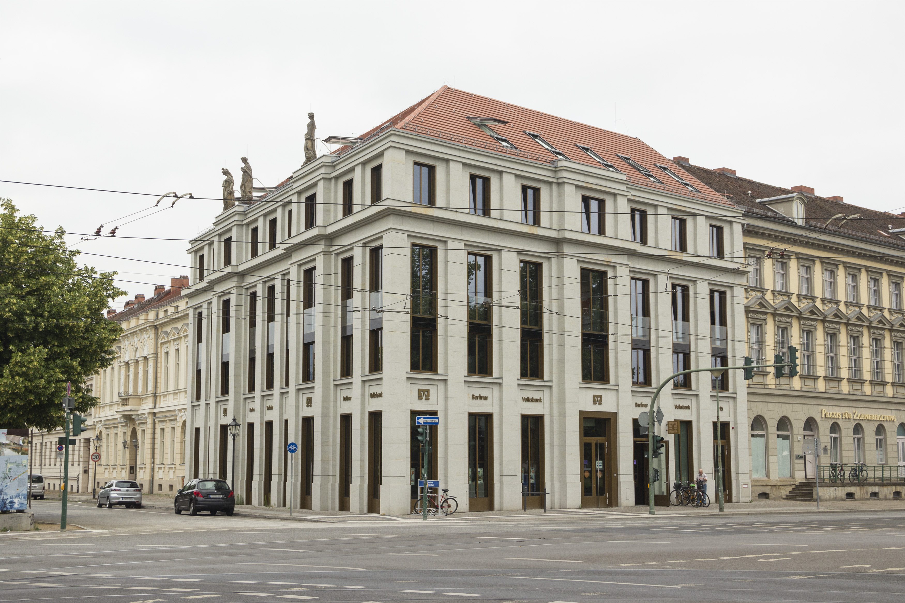 FinanzCenter der Berliner Volksbank in Potsdam (ehem. Alte Post)